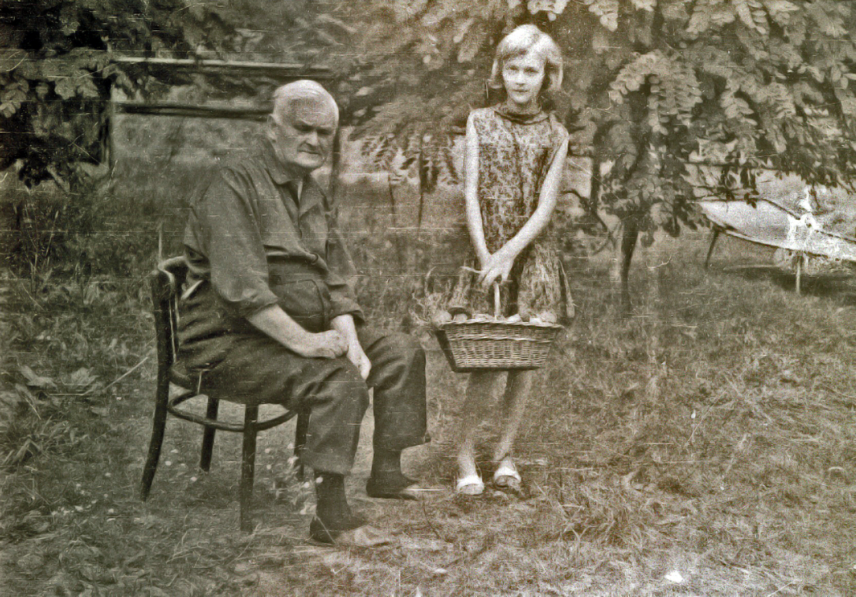 Bolesław Szabelski z córką Marią, Sadowne pod Warszawą, lata 60. XX w. / Boleslaw Syabelski and his daughter Maria, Sadowne near Warsaw, 60s.